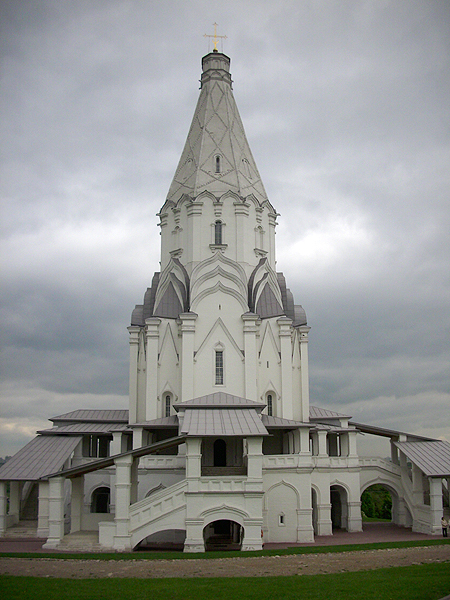 Церковь Вознесения Господня